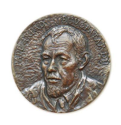 A Papp Árpád Búvópatak-díj érméje, amit a díjazottak kapnak